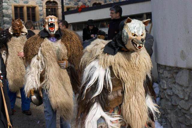 Un des personnages principaux du carnaval d'Evolène : Une peluche